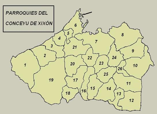 Parroquies del Conceyu de Xixón